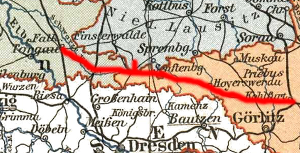 Streckennetz der Oberlausitzer Eisenbahn-Gesellschaft, basierend auf File:Prussia (political map before 1905).jpg